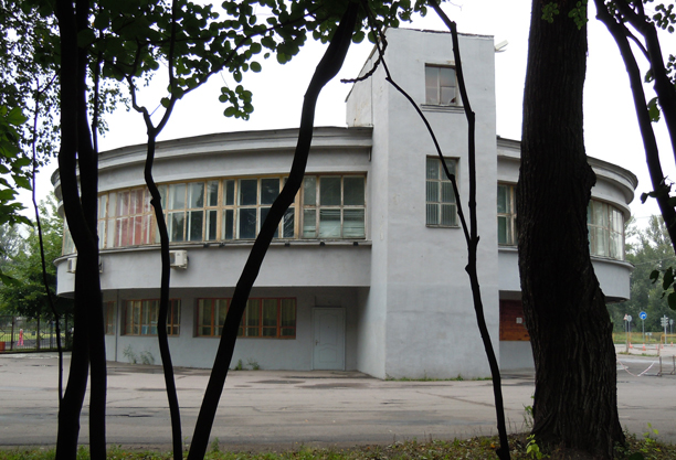 Стадион «Динамо», Ленинград (Санкт-Петербург), архитектор О.Л.Лялин.